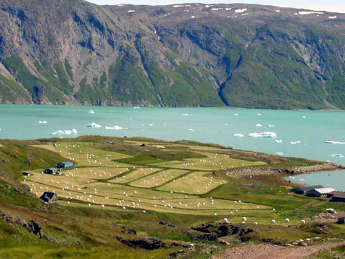 Farmen in Südgrönland